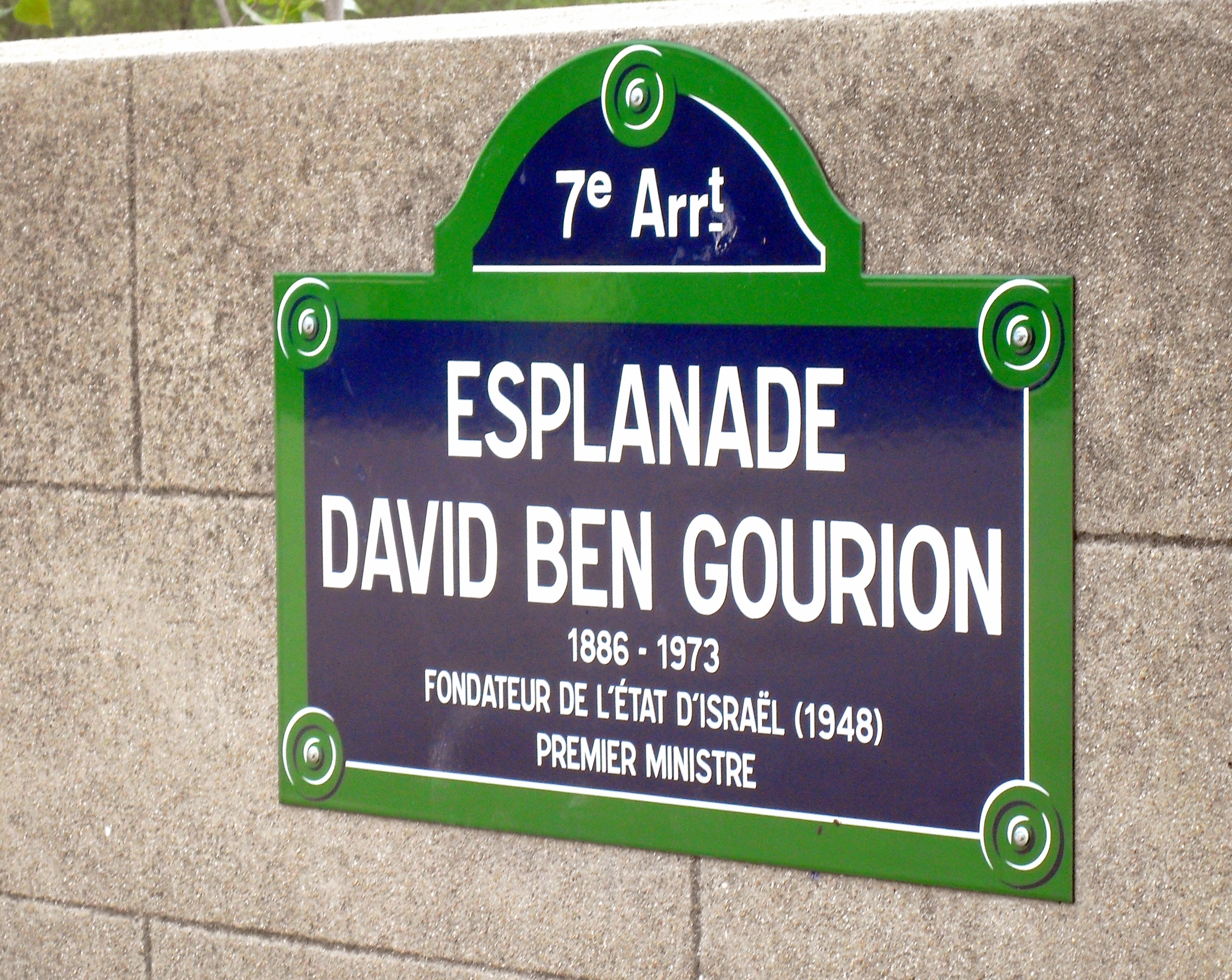 7e Arrt ESPLANADE DAVID BEN GOURION 1886 - 1973 FONDATEUR DE L'ÉTAT D'ISRAËL (1948) PREMIER MINISTRE France, Paris 7e - Une plaque de l'esplanade David Ben Gourion, inaugurée le 15 avril 2010, en présence de personnalités prestigieuses dont le président d'Israël, Shimon Peres, le maire de Paris, Bertrand Delanoë, et le maire du 7e arrondissement de Paris, Rachida Dati. Cette promenade est située dans le 7e arrondissement de Paris en bord de Seine, sur le Quai Branly devant le Musée des Arts Premiers, à quelques pas de la Tour Eiffel. Cette initiative a suscité des manifestations hostiles de la part des activistes pro-palestiniens, et le 21 avril 2010, trois de ces plaques ont disparu.